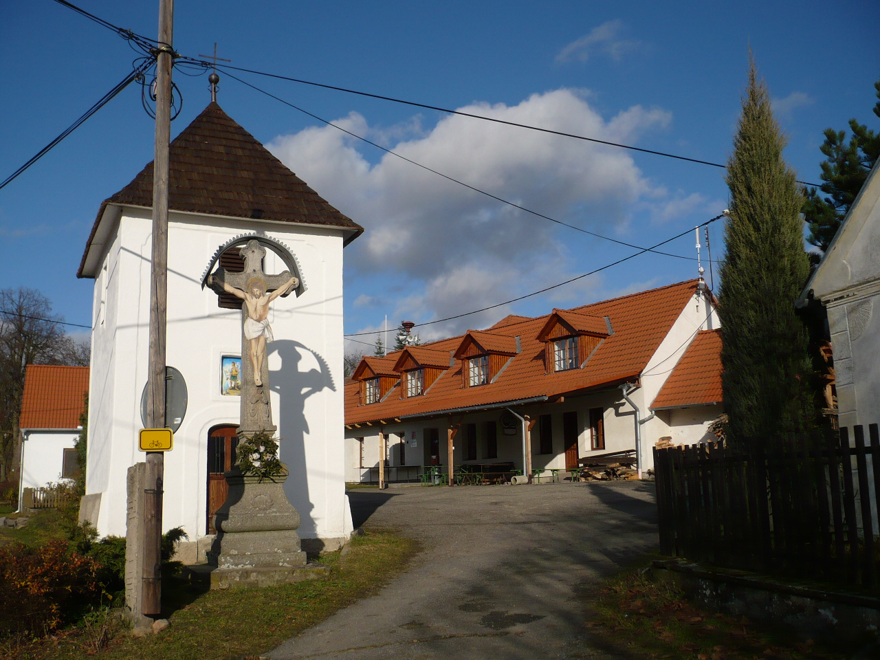 Zvonice na návsi v obci Přeckov